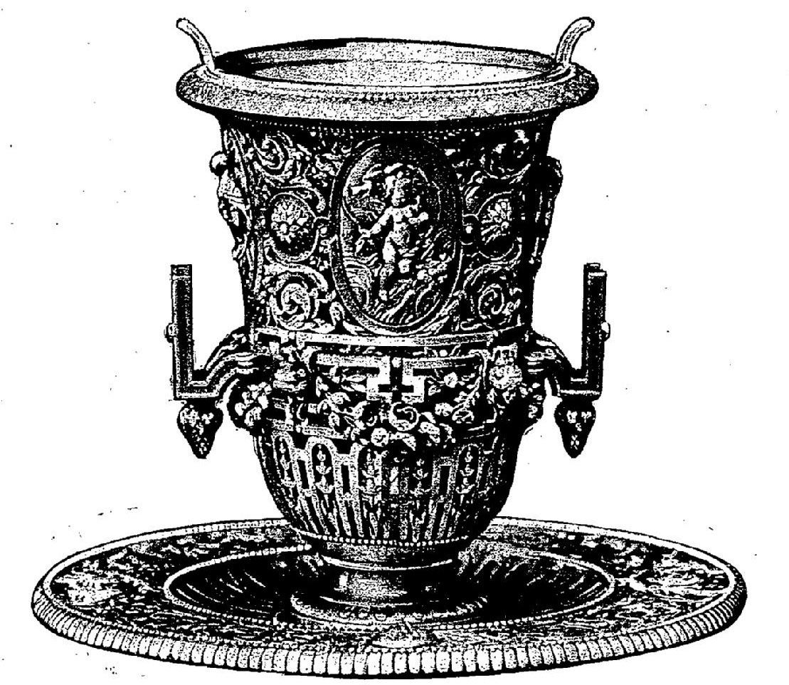 Porte-fleur Louis XVI en bronze argenté avec intérieur en cristal bleu, composé par Constant Sévin et exécuté par la maison Ferdinand Barbedienne